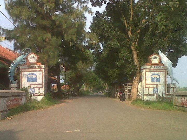 Dengan tugu Udang dan bandeng menunjukkan desa Limbangan desa Minapolitan disampin agriculture